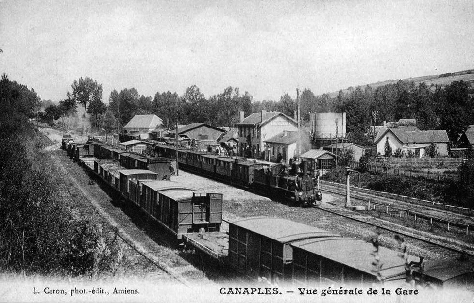 Vue d'ensemble de l'intérieur de la gare de Canaples au début des années 1900.